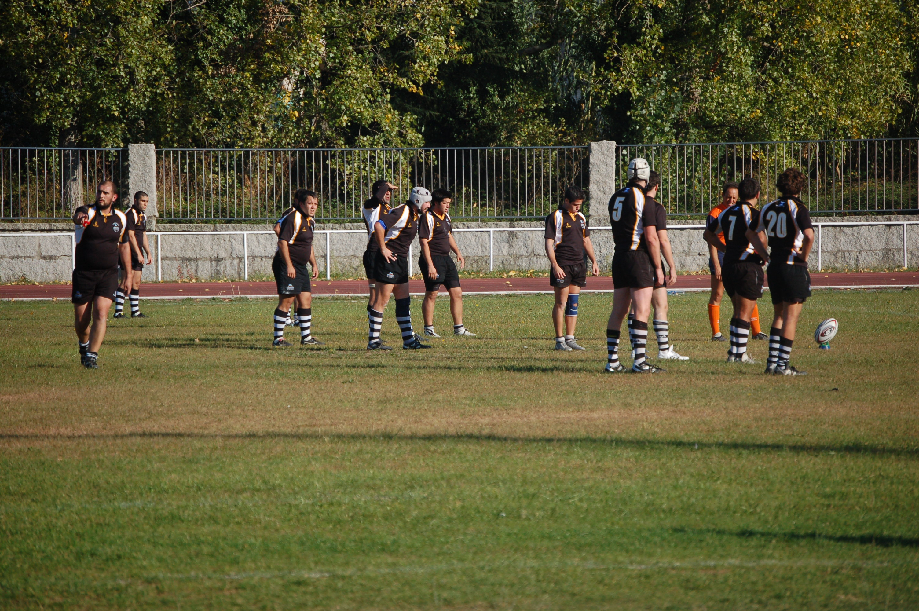 lance de partido do Mareantes Rugby Clube